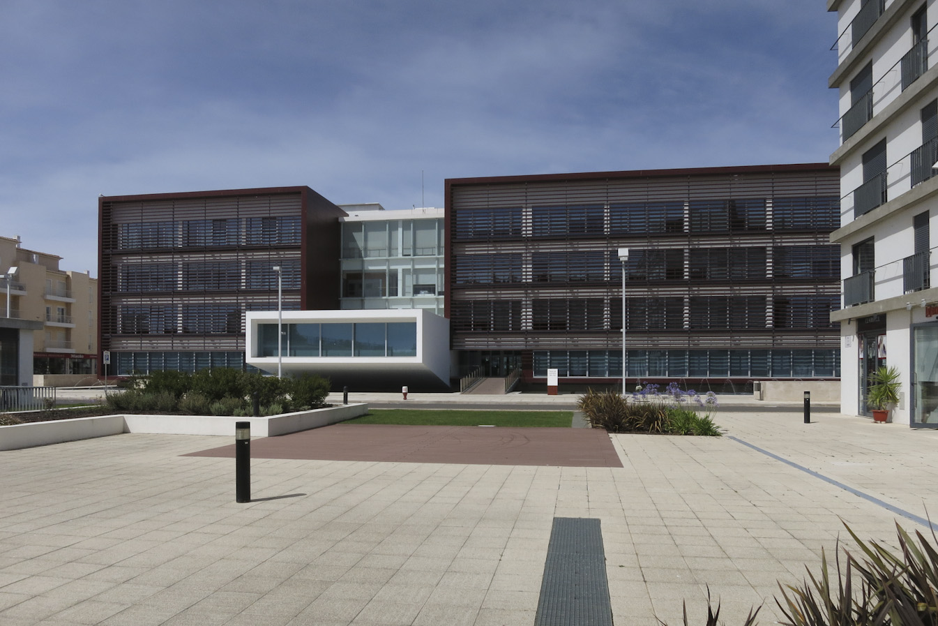 Câmara Municipal de Lagos; Arq. António Meirelles - Progitape